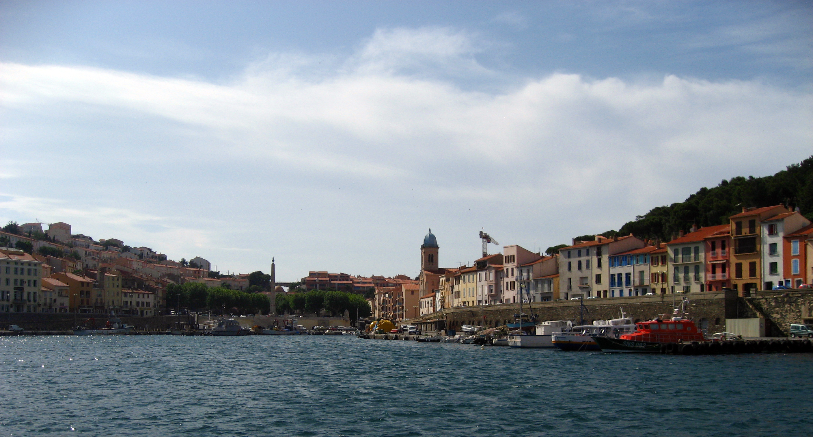 Port-Vendres (France/Catalunya)